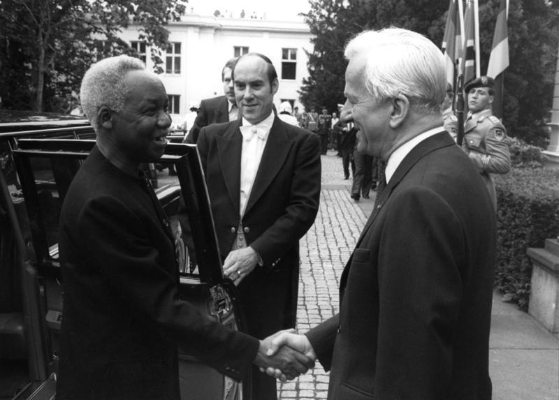 Bonn, 21. Mai 1985 Der Präsident der Vereinigten Republik Tansania und Frau Nyerere statteten der Bundesrepublik Deutschland vom 21. bis 23. Mai 1985 einen offiziellen Besuch ab. Während seines Aufenthaltes in Bonn konferierte Präsident Dr. Julius K. Nyerere mit Bundespräsident Dr. Richard von Weizsäcker, Bundeskanzler Helmut Kohl, dem Bundesminister des Auswärtigen, Hans-Dietrich Genscher, dem Bundesminister für wirtschaftliche Zusammenarbeit, Dr. Jürgen Warnke, sowie den Vertretern der politischen Parteien und der deutschen Wirtschaft. Im Bild: Bundespräsident Dr. Richard von Weizsäcker begrüßt Präsident Dr. Julius K. Nyerere vor der Villa Hammerschmidt